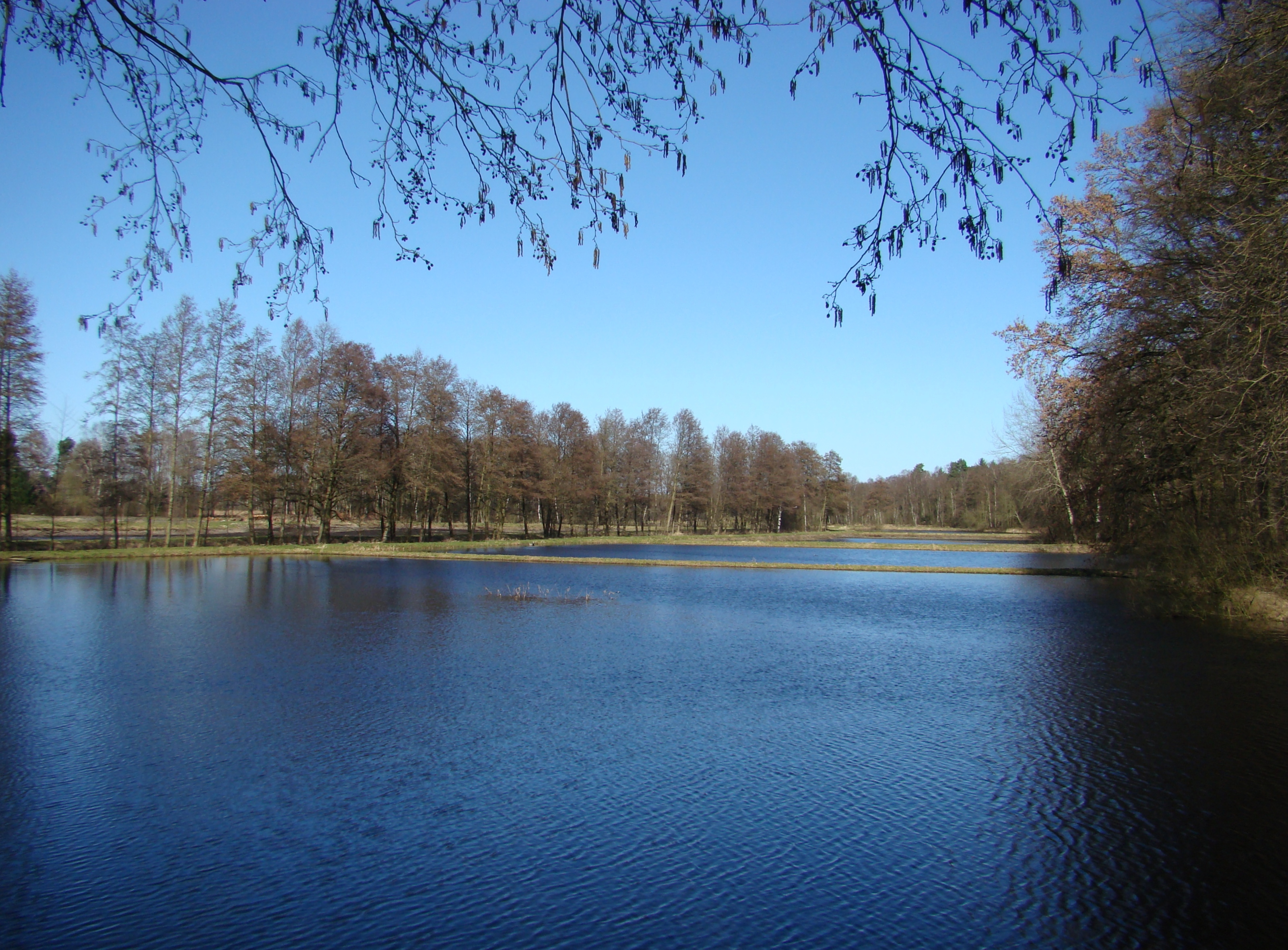 Die Aschauteiche